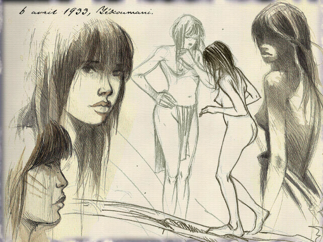 Capture d'écran du jeu vidéo L'Amerzone (1999), développé et édité par Microïds.